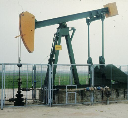 Übertageteil einer Erdöltiefpumpe, Fördersonde We051, Erdölfeld Weddigeloh